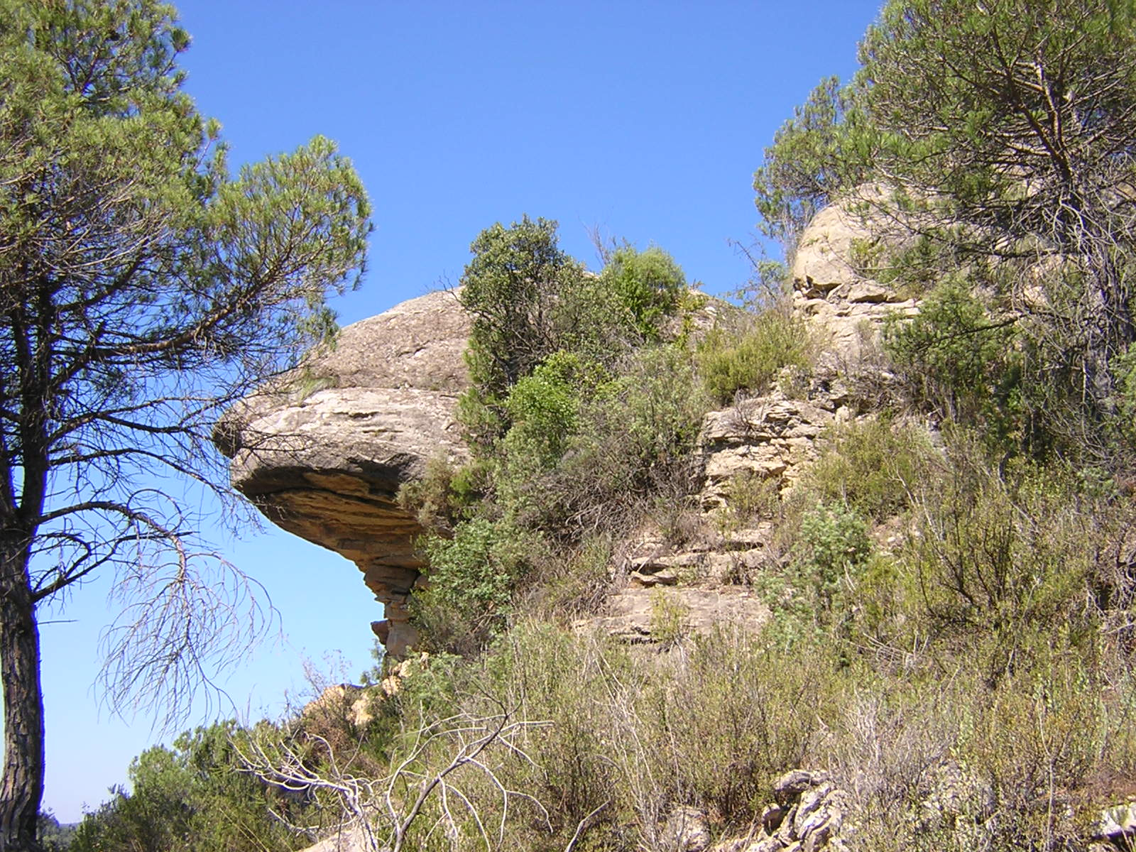 El Roc del Paraigua (Castellcir i Monistrol de Calders, Moianès)